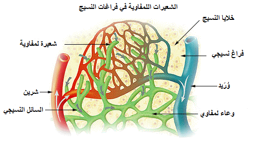 الشعيرات اللمفاوية في فراغات النسيج